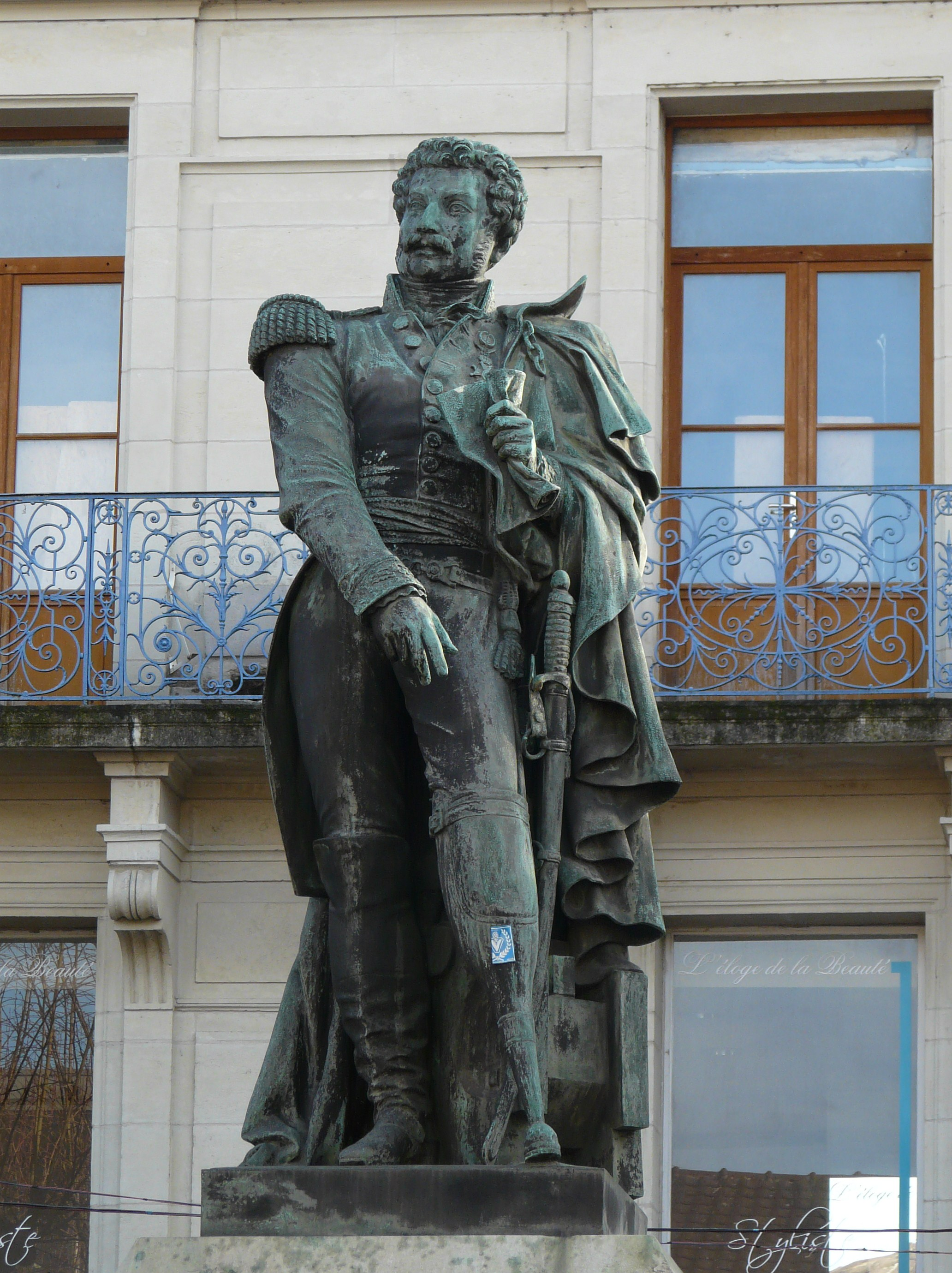 La statue du général Daumesnil à Périgueux, Dordogne, France. On remarque nettement sa jambe de bois.